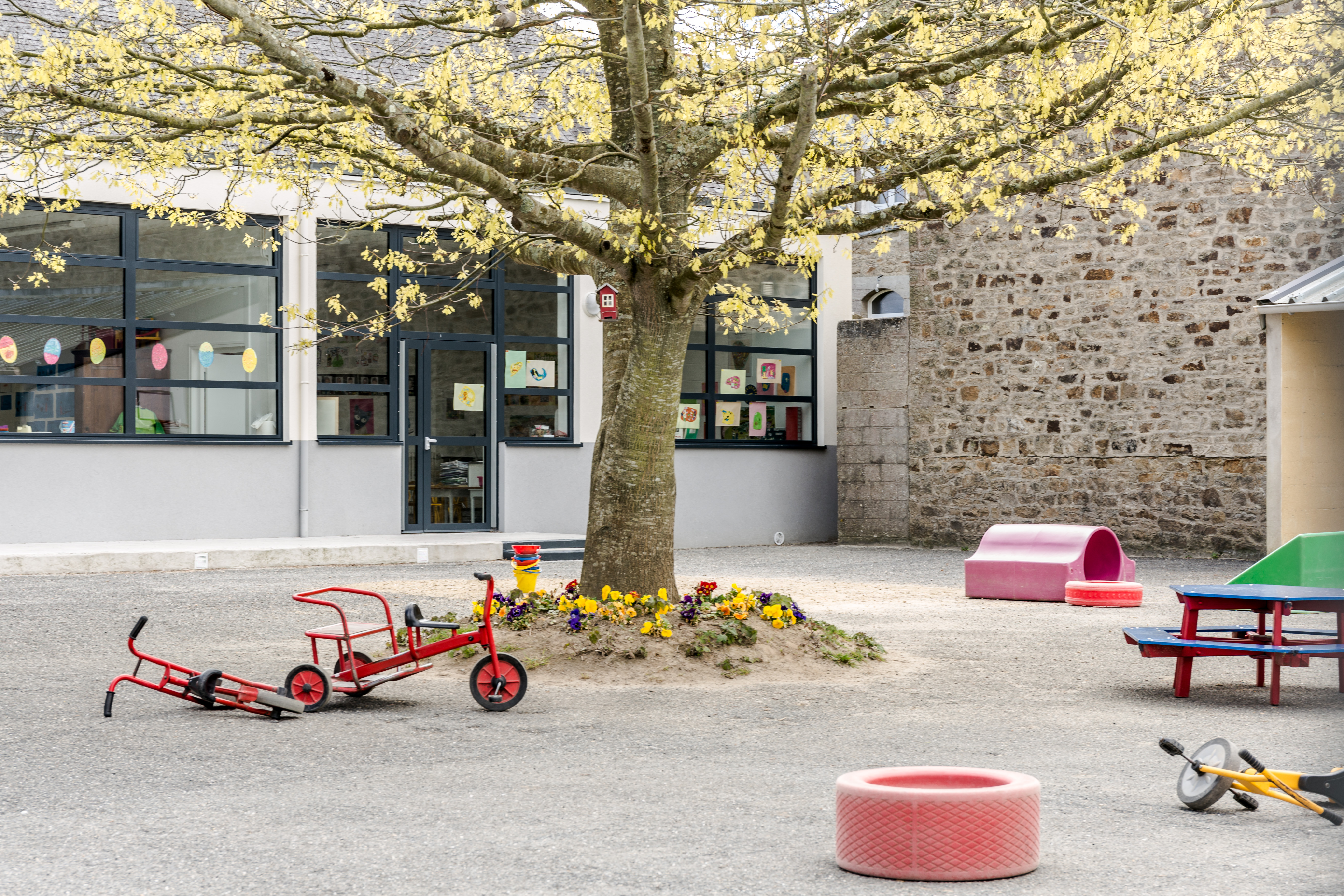 Cour de l'école maternelle Sainte-Marie à Saint-Pol-de-Léon.